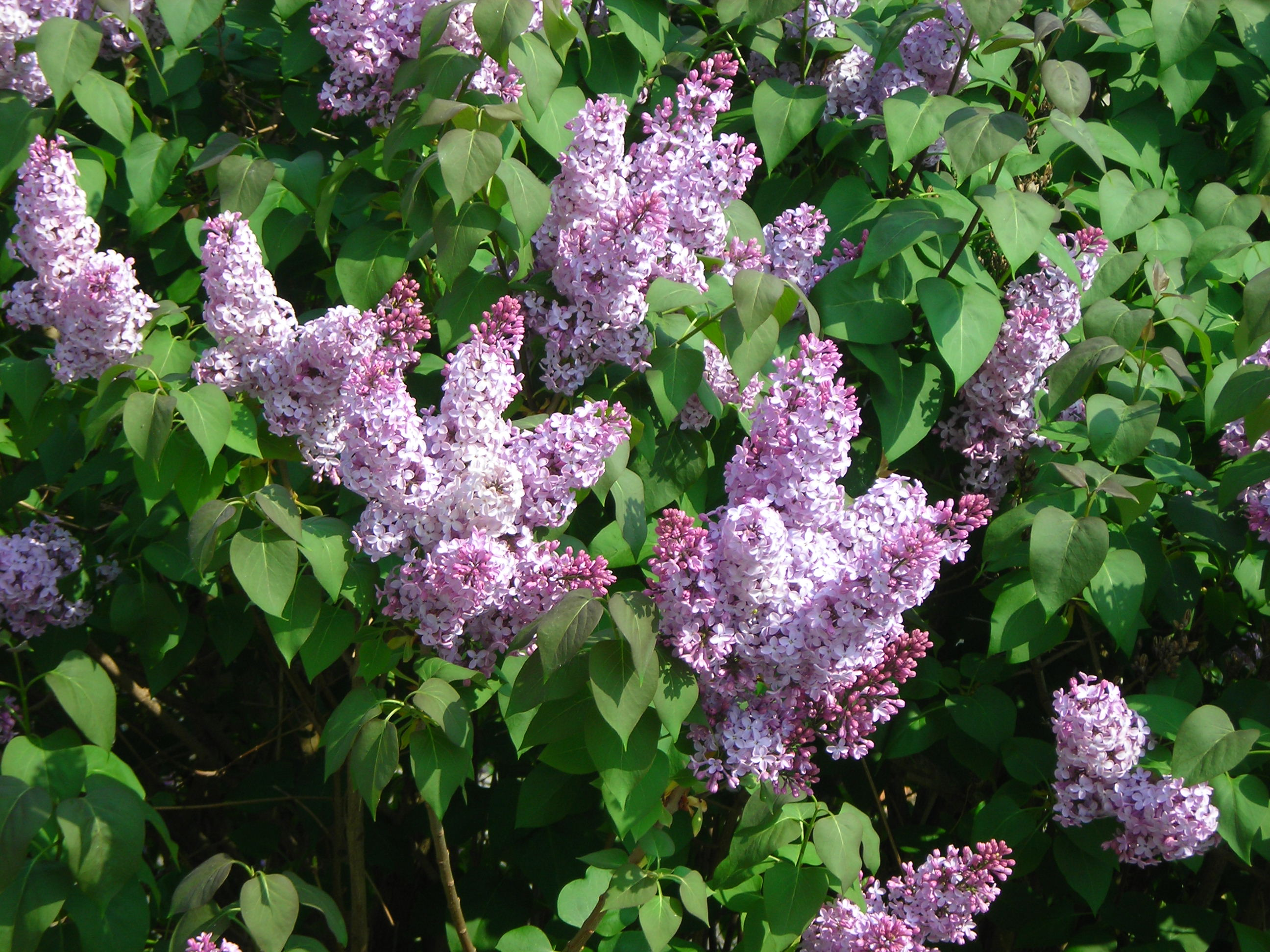 Fleurs